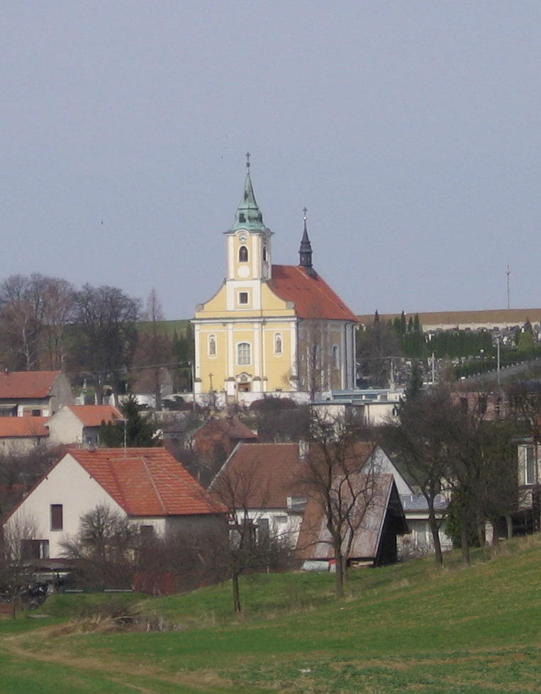 sv. Jana Křtitele Church, Jalubí, Czech Republic